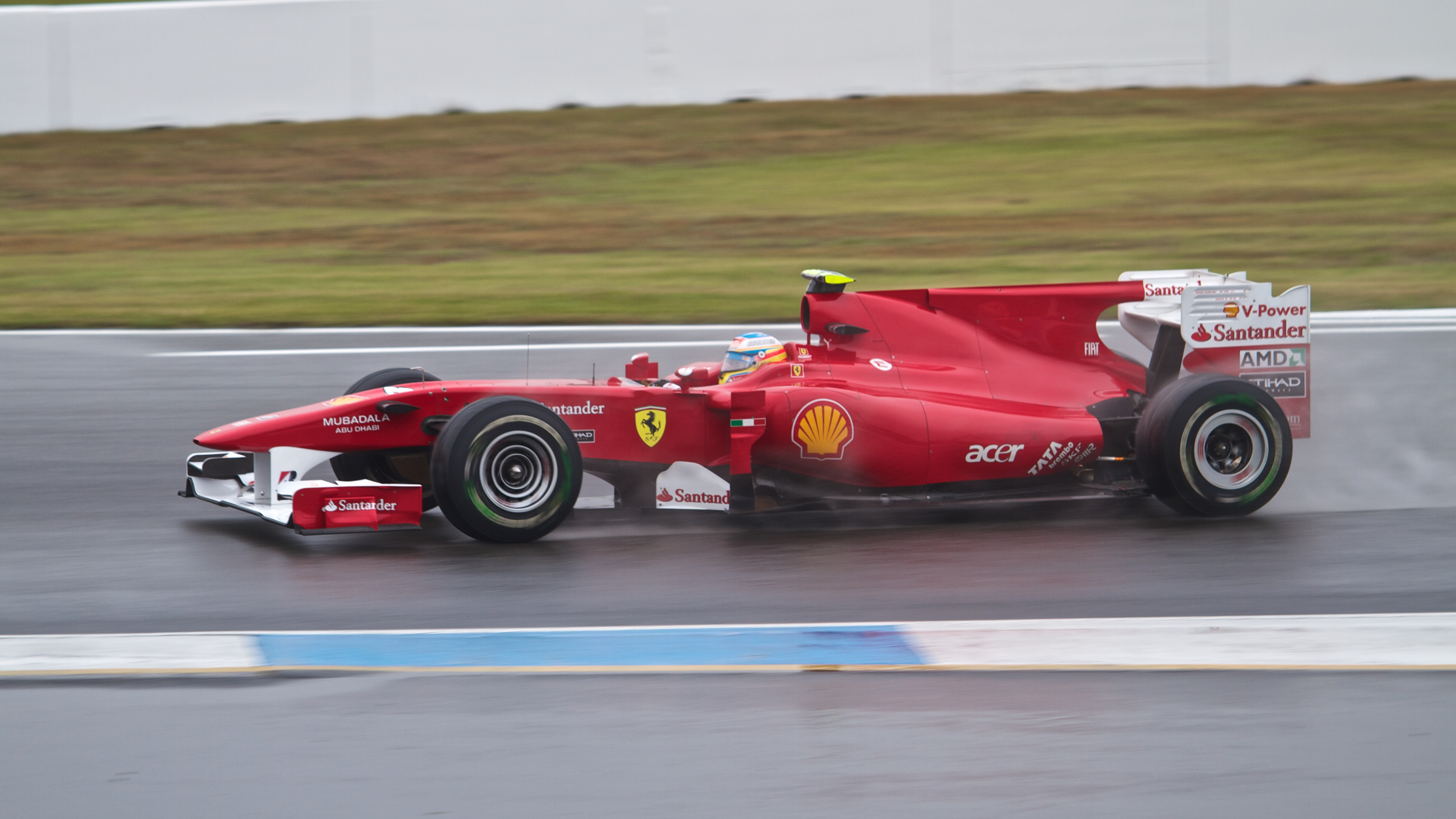 Fernando Alonso à Hockenheim en 2010